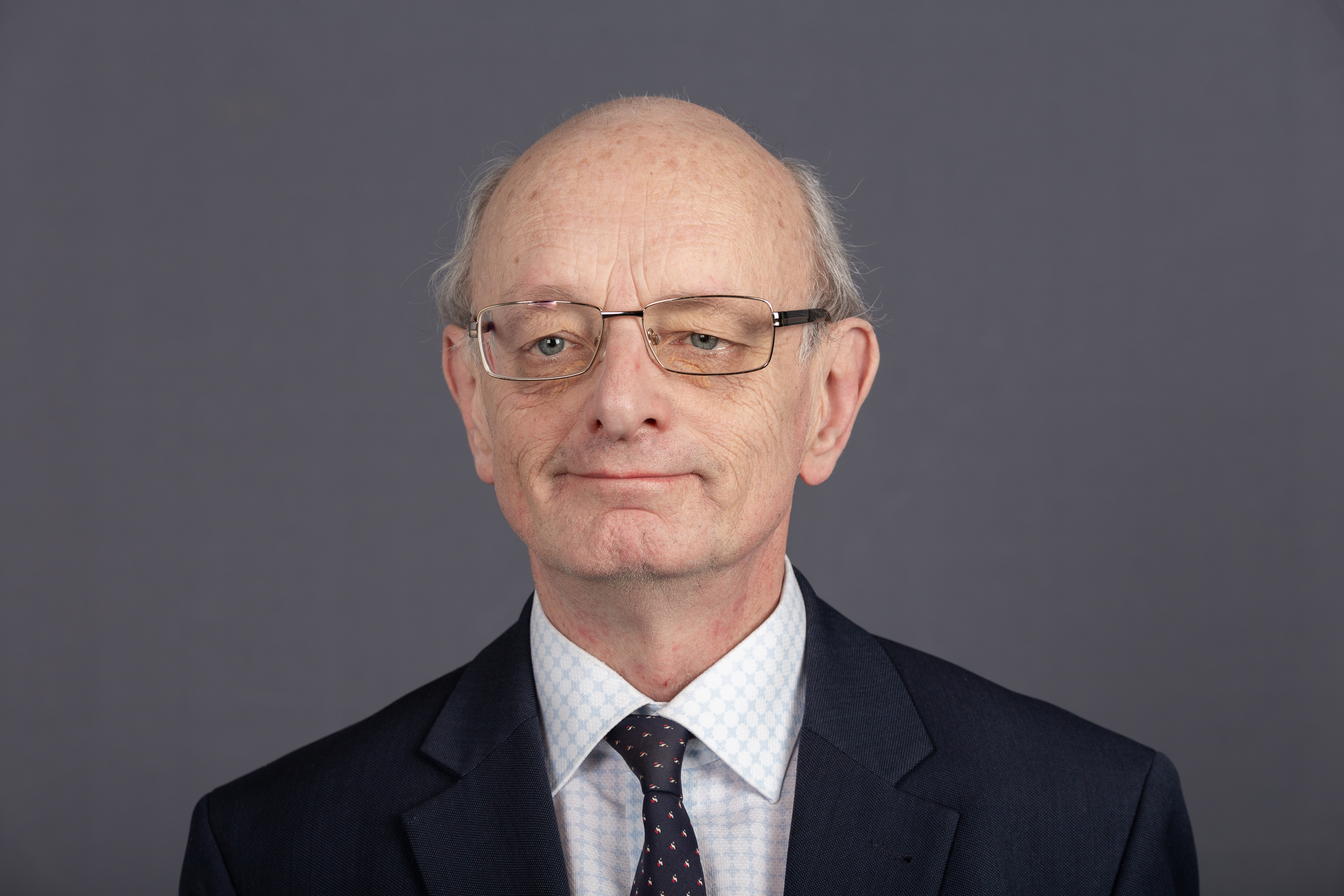 Deutscher Bundestag; Wolfgang Madai, CDU, ehem. MdL Sachsen